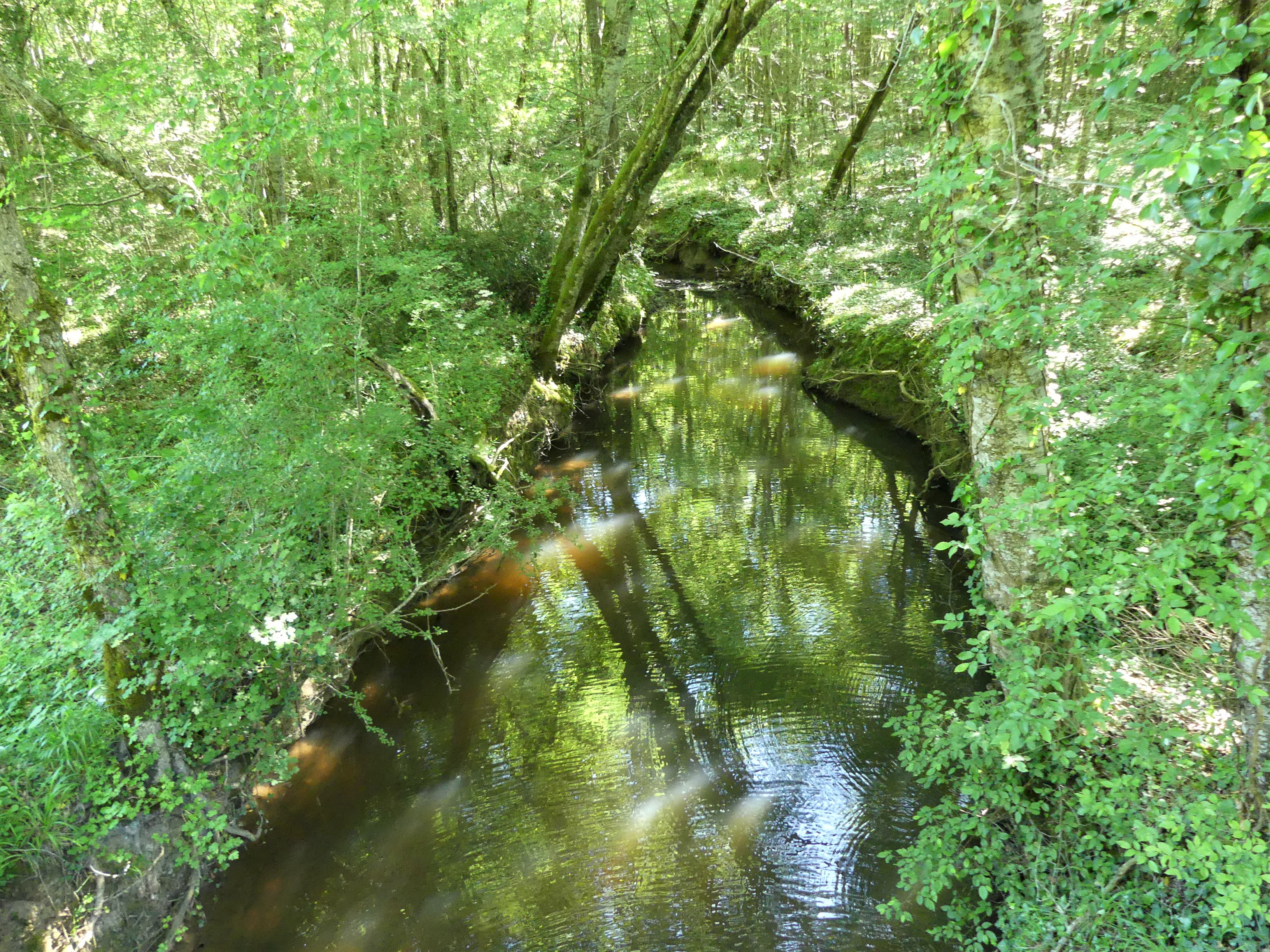 Le Courbarieu en aval du pont de la route départementale 10E1 entre les communes de Moulin-Neuf (à gauche) et Minzac (sur l'autre rive), Dordogne, France.